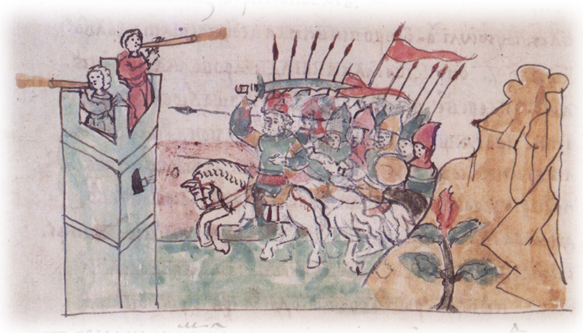 Подступ к городу Переяславцу и его взятие Святославом Игоревичем.